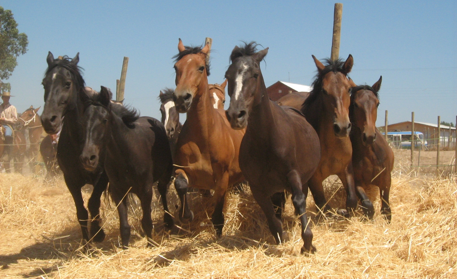 La trilla a yegua suelta es una antigua tradición campesina que se realiza en Chile. Se usan yeguas y caballos que pisotean las gavillas para separar la paja del grano. – Actualmente existen maquinarias que han desplazado esta actividad. Sin embargo se realiza por tradición, generalmente en los meses de verano. La celebración posterior incluye otras labores costumbristas, como Misa y casamiento a la chilena, carrera de perros galgos, rodeos, comidas típicas, etc.